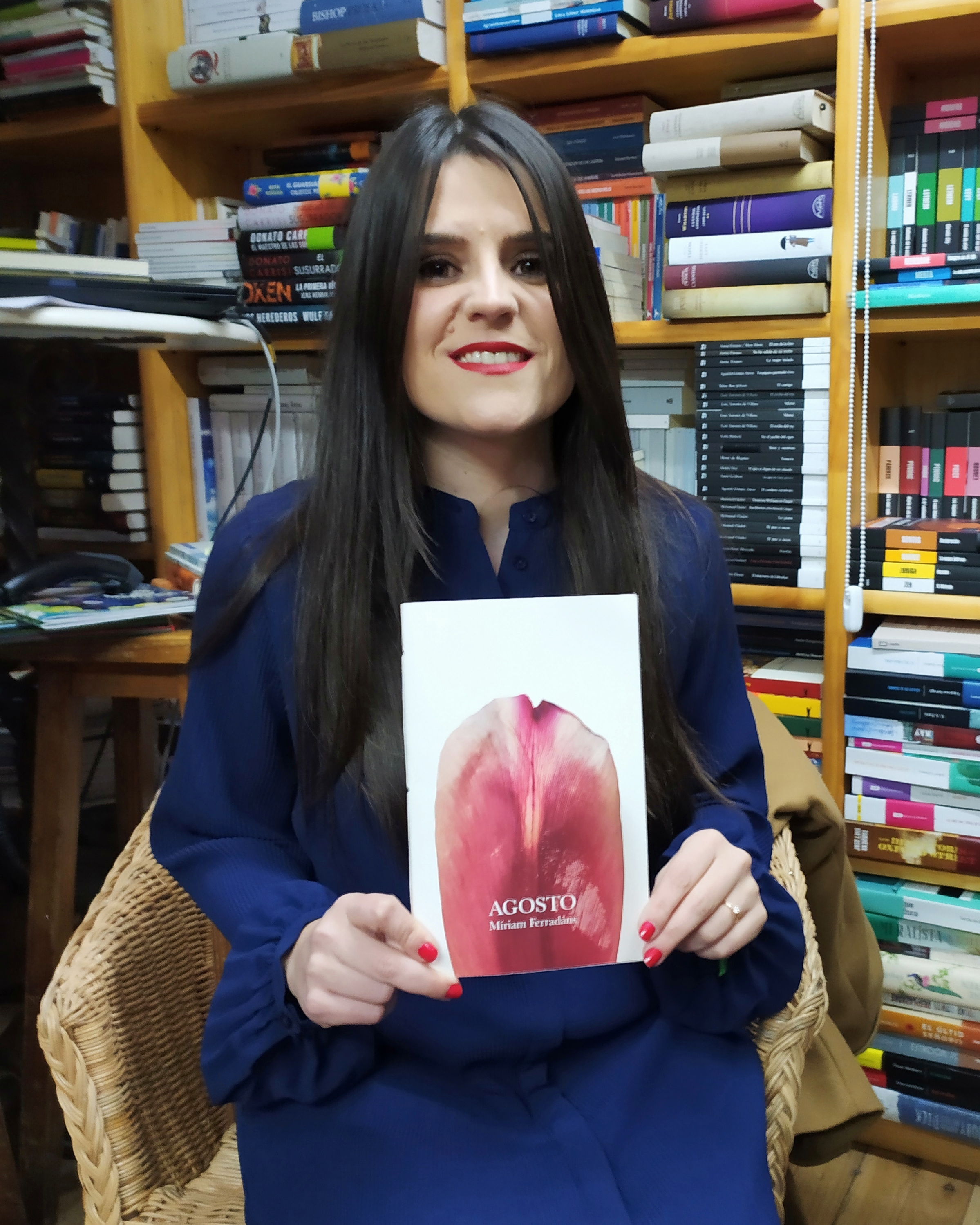 Miriam Ferradáns presentando "Agosto" na Libraría Paz de Pontevedra